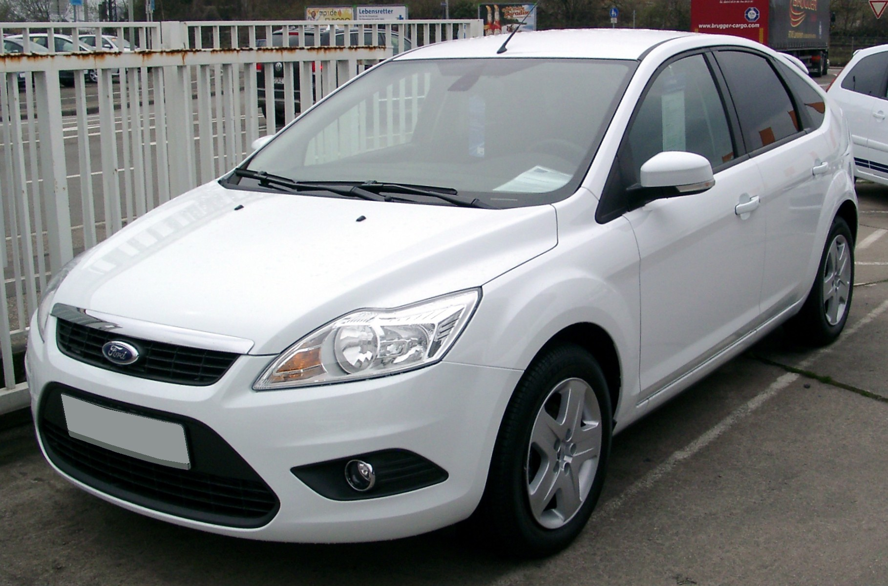 Ford Focus, 2. Generation Facelift